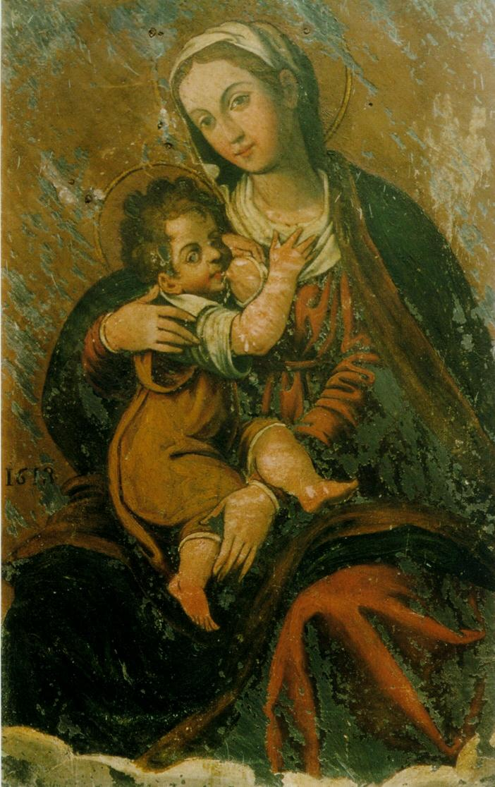 Aidone EN_Sicilia: Chiesa di Maria SS.ma delle Grazie, dipinto secentesco, su pietra, raffigurante la Madonna che allatta.La leggenda vuole che sia stao trovato da un contadino ed è legato alla costruzione della stessa chiesa.